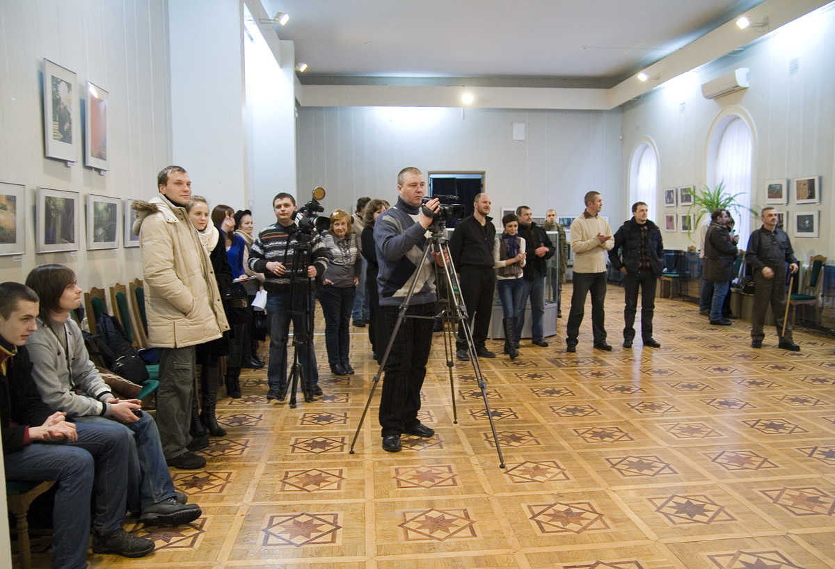 Відкриття виставки "Поділля 2011" в Краєзнавчому музеї